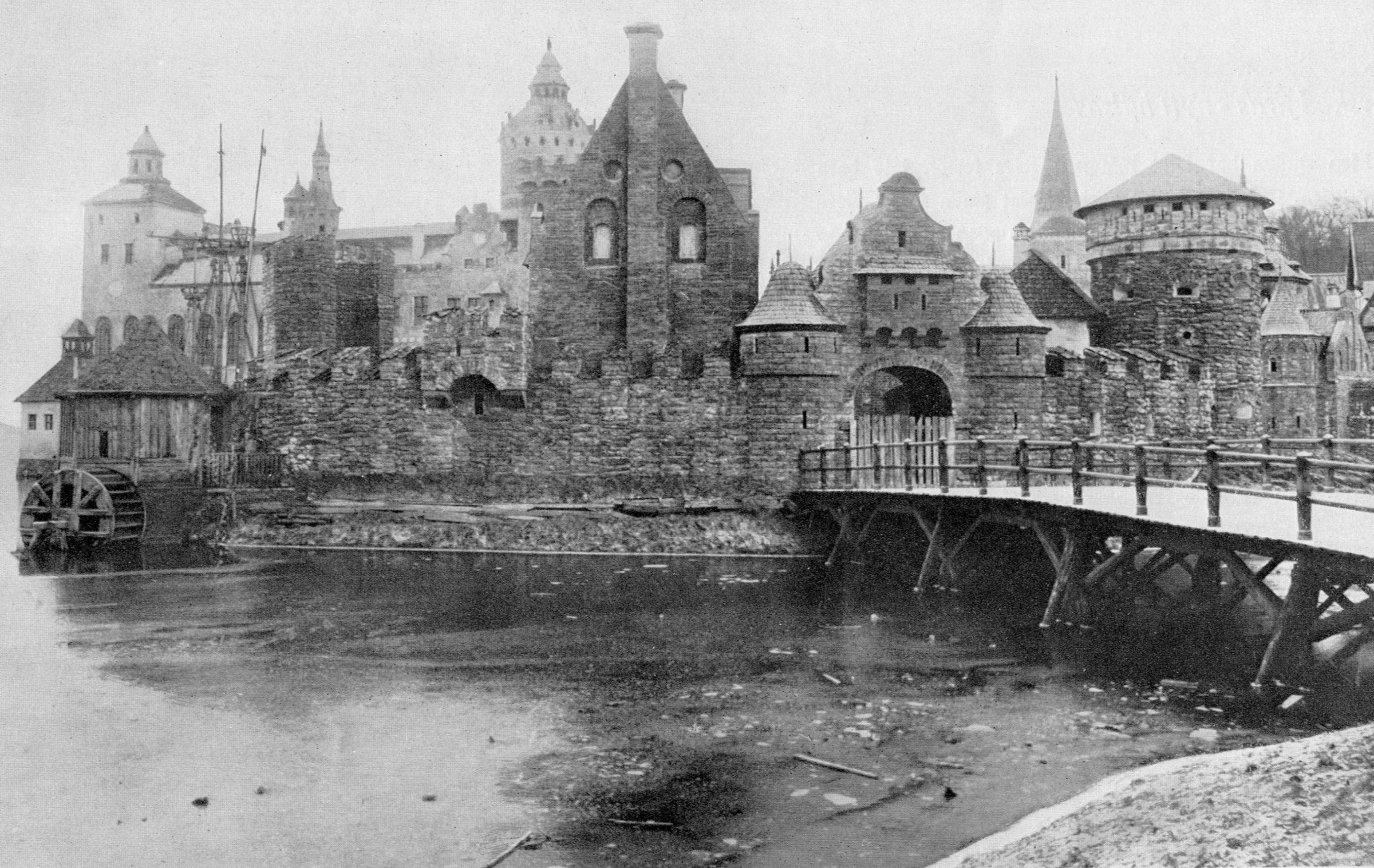 Helgeandshuset på Konst och industriutställningen 1897. "Gamla Stockholm"